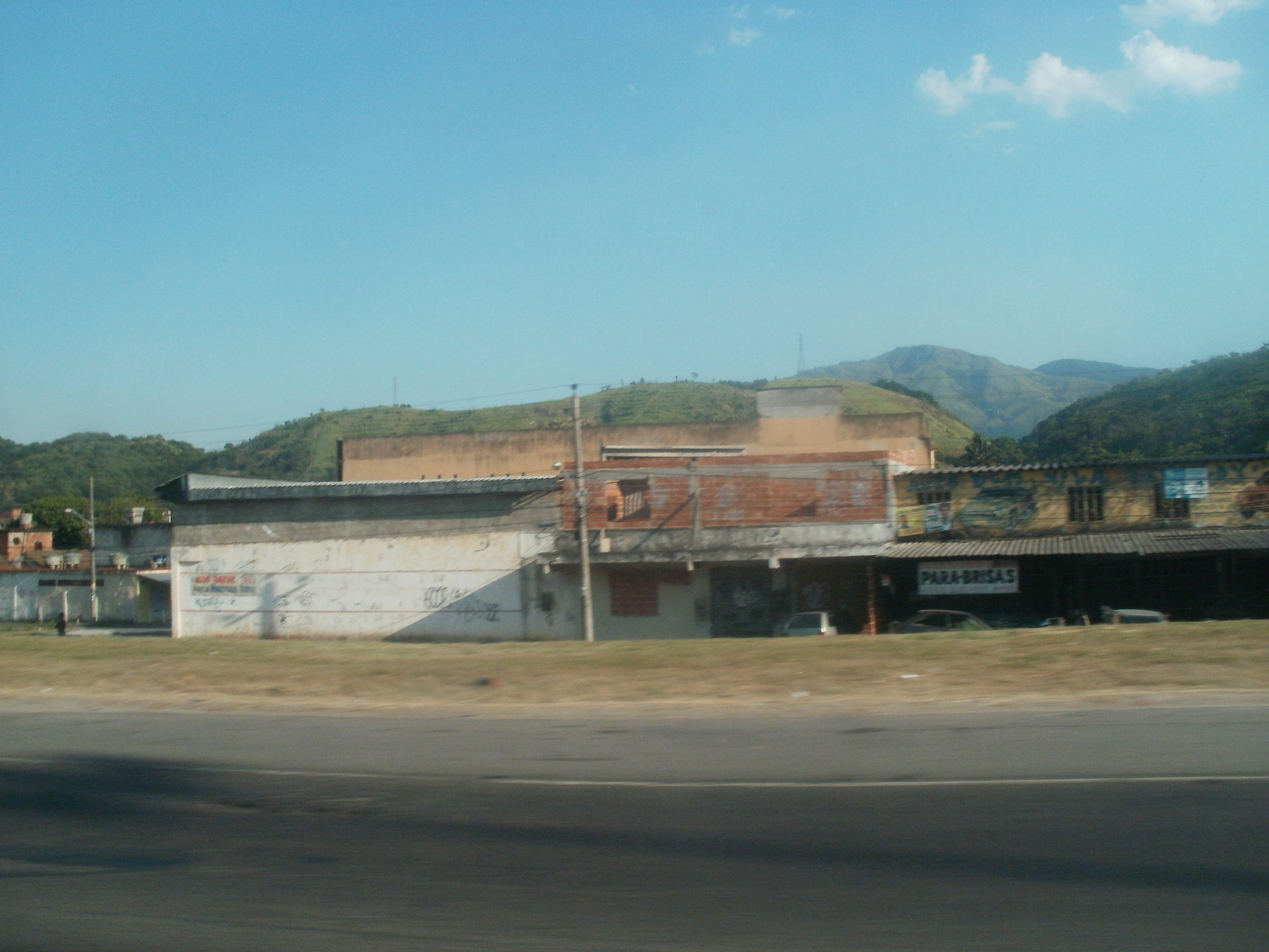 Vista de Vila Kennedy, sub-bairro de Bangu, Rio de Janeiro, Brasil.